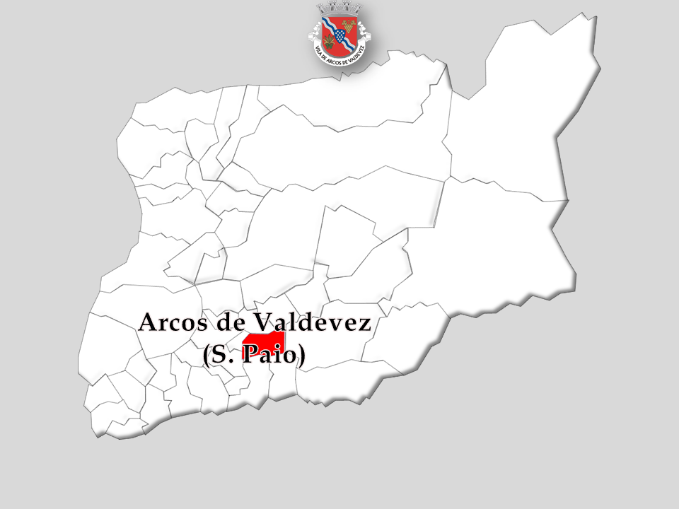 Censoa 1864/2011